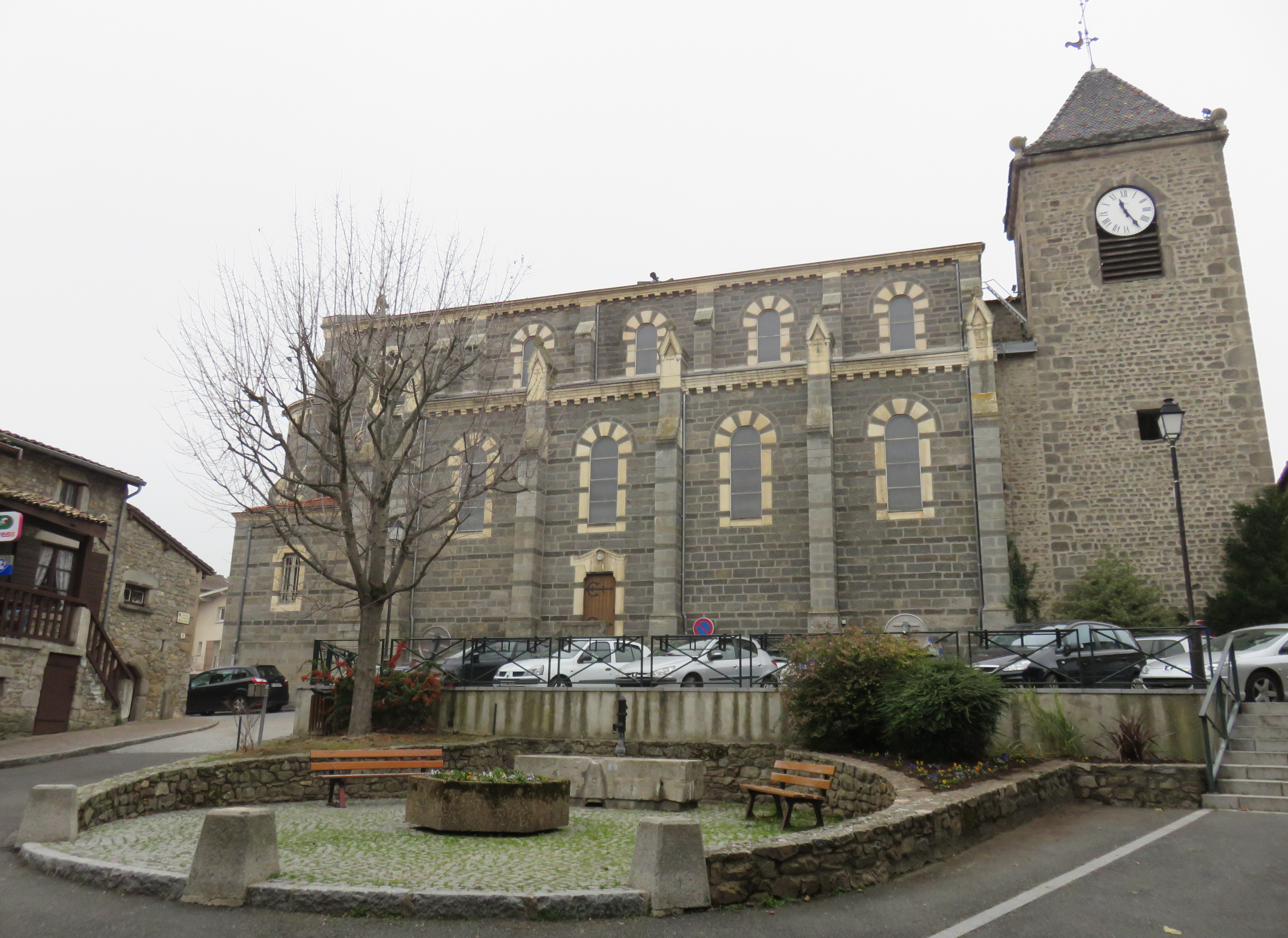 L'église Saint-Jean-l'Évangéliste à Messimy (Rhône, France).